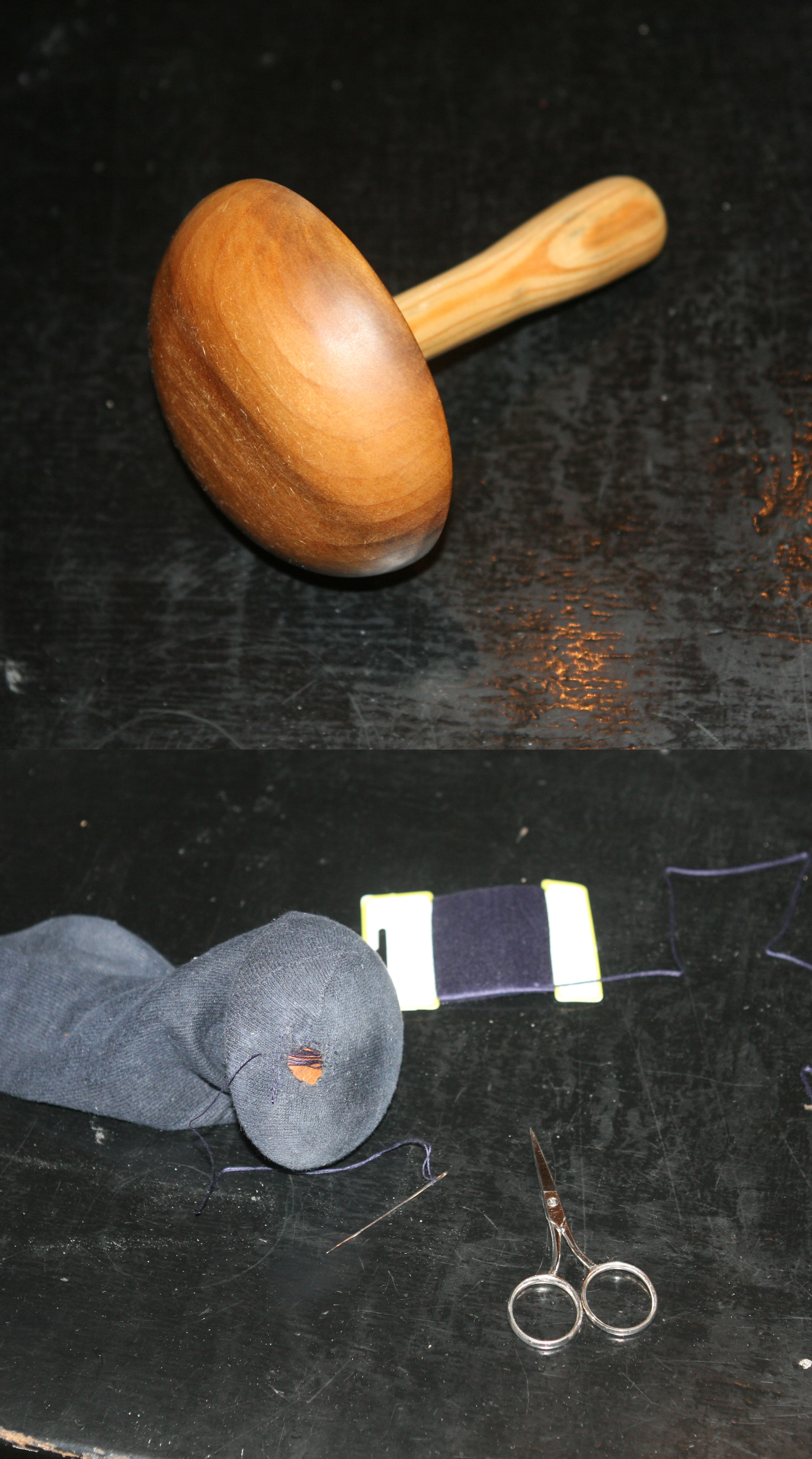 Et stoppeæg, et redskab til brug ved stopning af strømper.